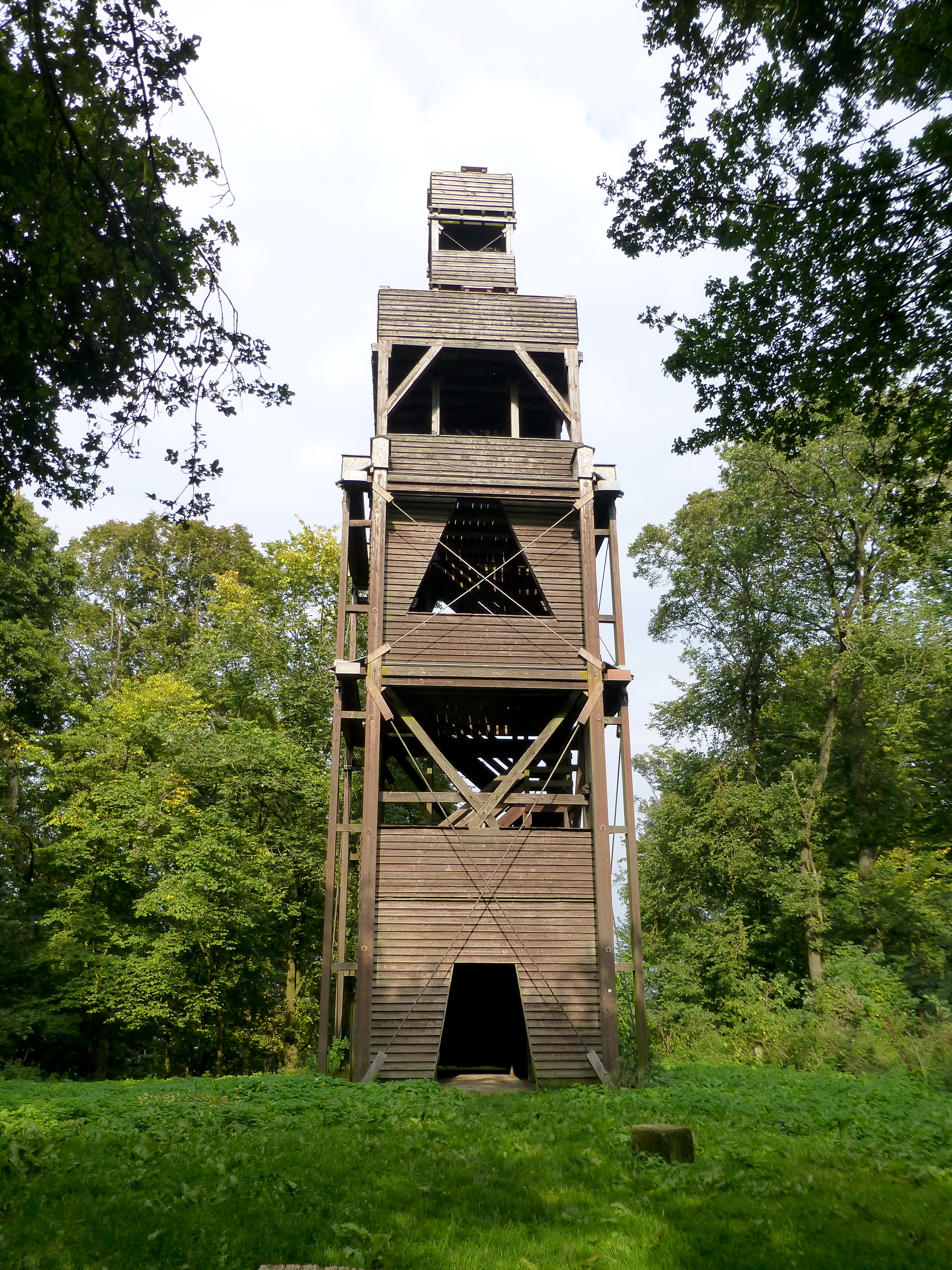 Odenbergturm auf dem Odenberg nördlich von Gudensberg; im Vordergrund der Gipfelstein auf dem Berg